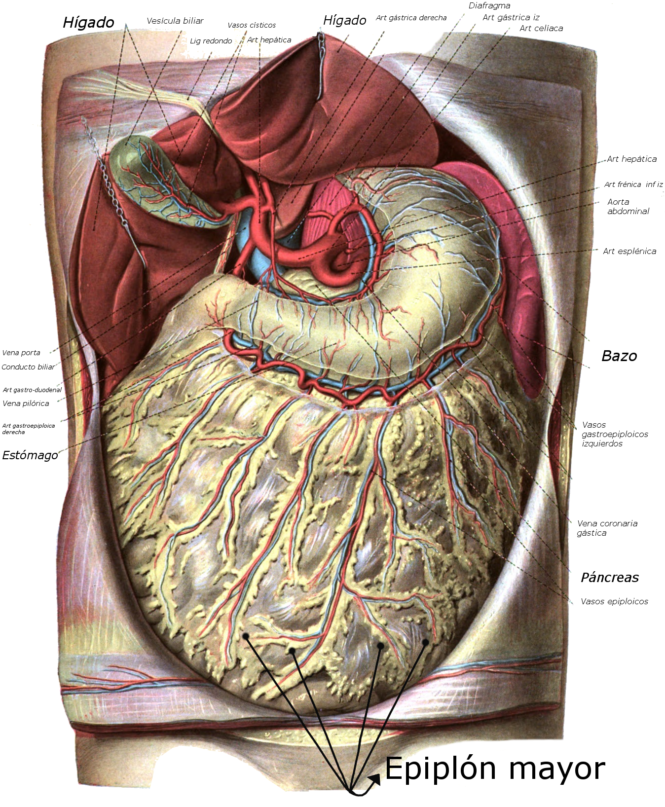 Imagen del abdomen en la que es visible el epiplón mayor.